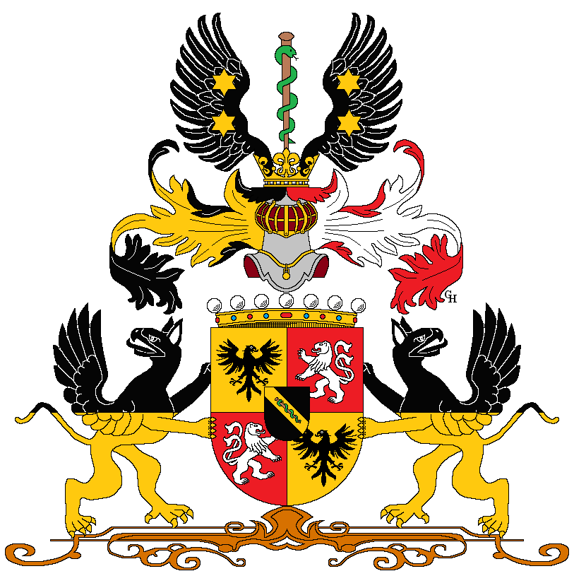 Wappen des Mediziners und Politikers Dr. Carl von Rokitansky (1804–1878), verliehen anlässlich seiner Erhebung in den österreichischen Freiherrenstand 1874. Zeichnung von Gerd Hruška ( Für weitere Informationen zu dieser Standeserhebung siehe (